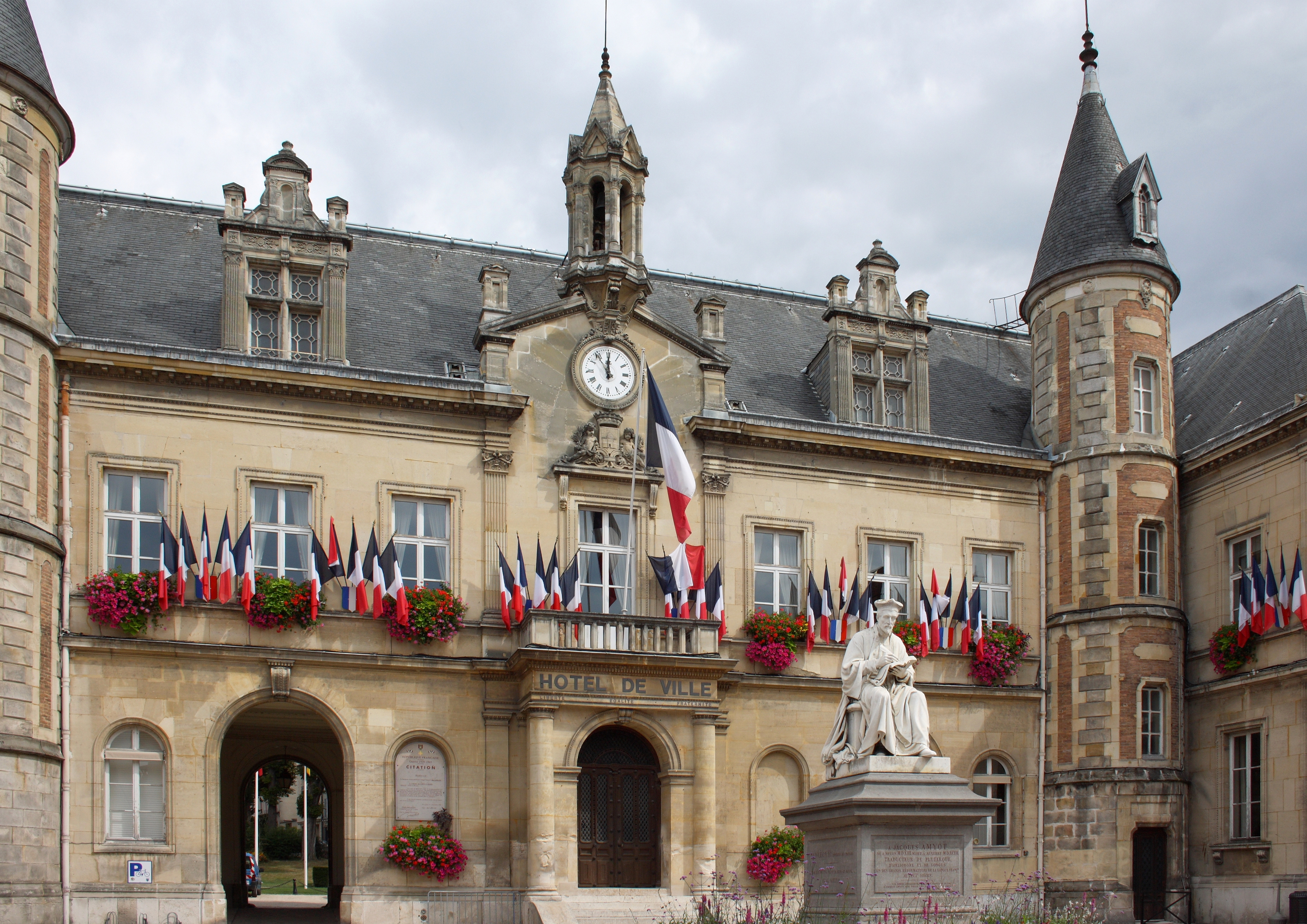 Hôtel de Ville (Rathaus) in Melun im Département Seine-et-Marne in der Region Île-de-France (Frankreich), Skulptur von Jacques Amyot